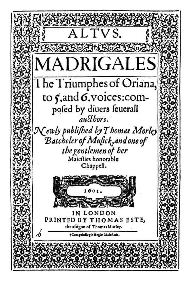 Page de titre de The Triumphs of Oriana, 1601. Imprimée par Thomas East et édité par Thomas Morley.